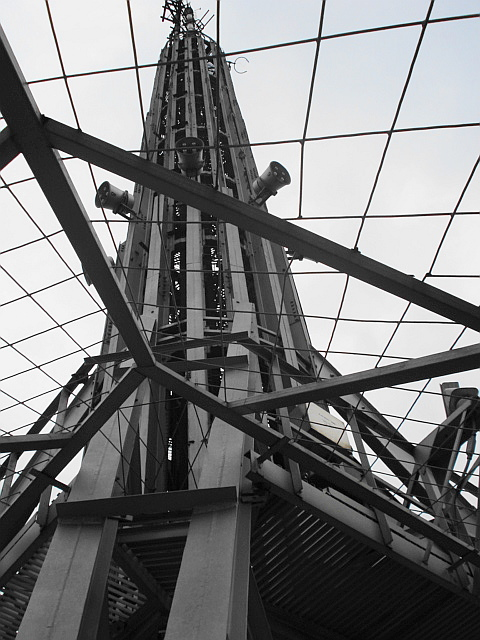 Espiral y antena de la Torre Latinoamericana en la Ciudad de México.